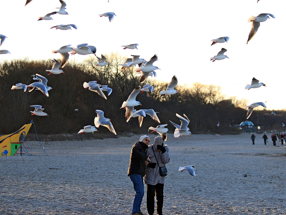 Möwenbedrängnis von Menschen am Strand der Ostsee bei Kołobrzeg (Kolberg)